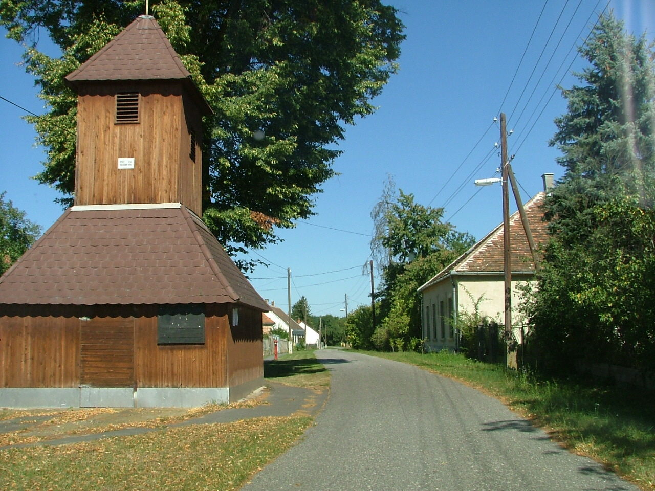 Holz Turm